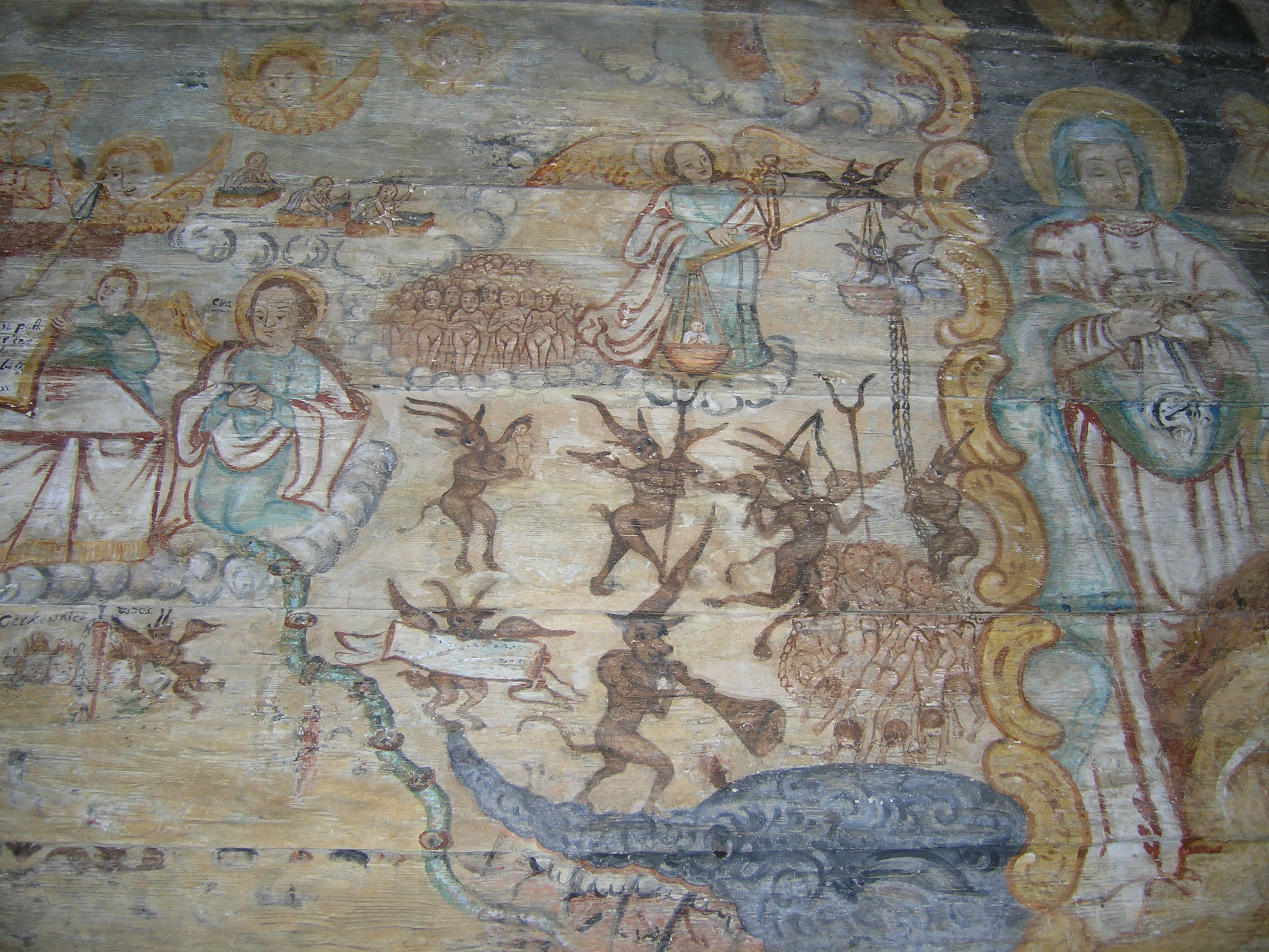 Sakrálna nástenná baroková maľba z 90. rokov 18. storočia Detail z nástennej maľby Posledného súdu, archanjel Michal vážiaci duše. (Tento motív je aj súčasťou erbu obce). Maľba pochádza od jedného autora. Potvrdzuje to rukopis na vykreslených drapériách. Kompozícia Posledného súdu, má svoj prvopočiatok v byzantskom – východokresťanskom umení. Obraz naznačuje dej, ktorý sa odohráva od súdneho trónu. Maľba je urobená technikou glejovej tempery na drevenom podklade